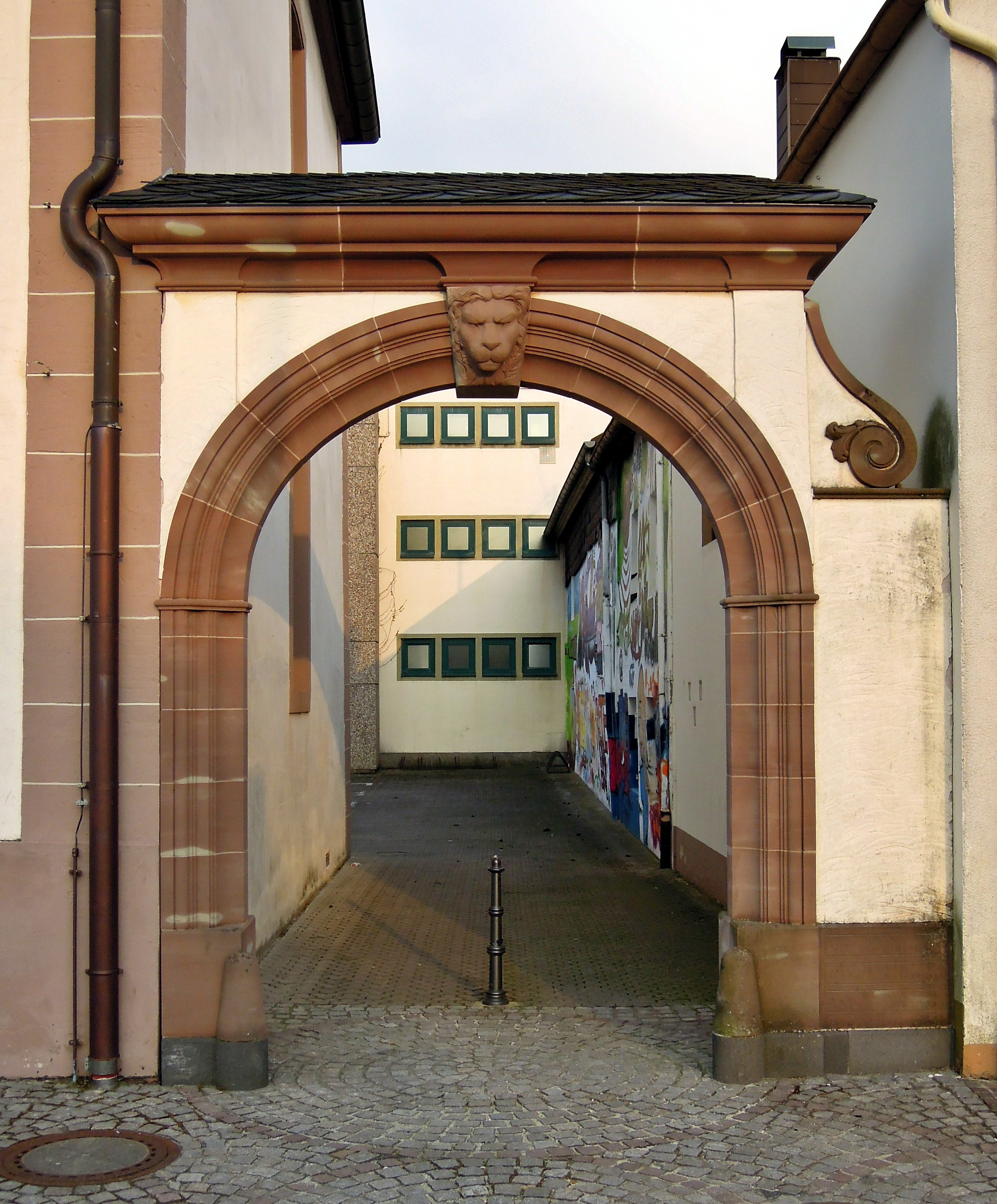 Schlossplatz, Schloss Saarwellingen, 1766 (Einzeldenkmal)